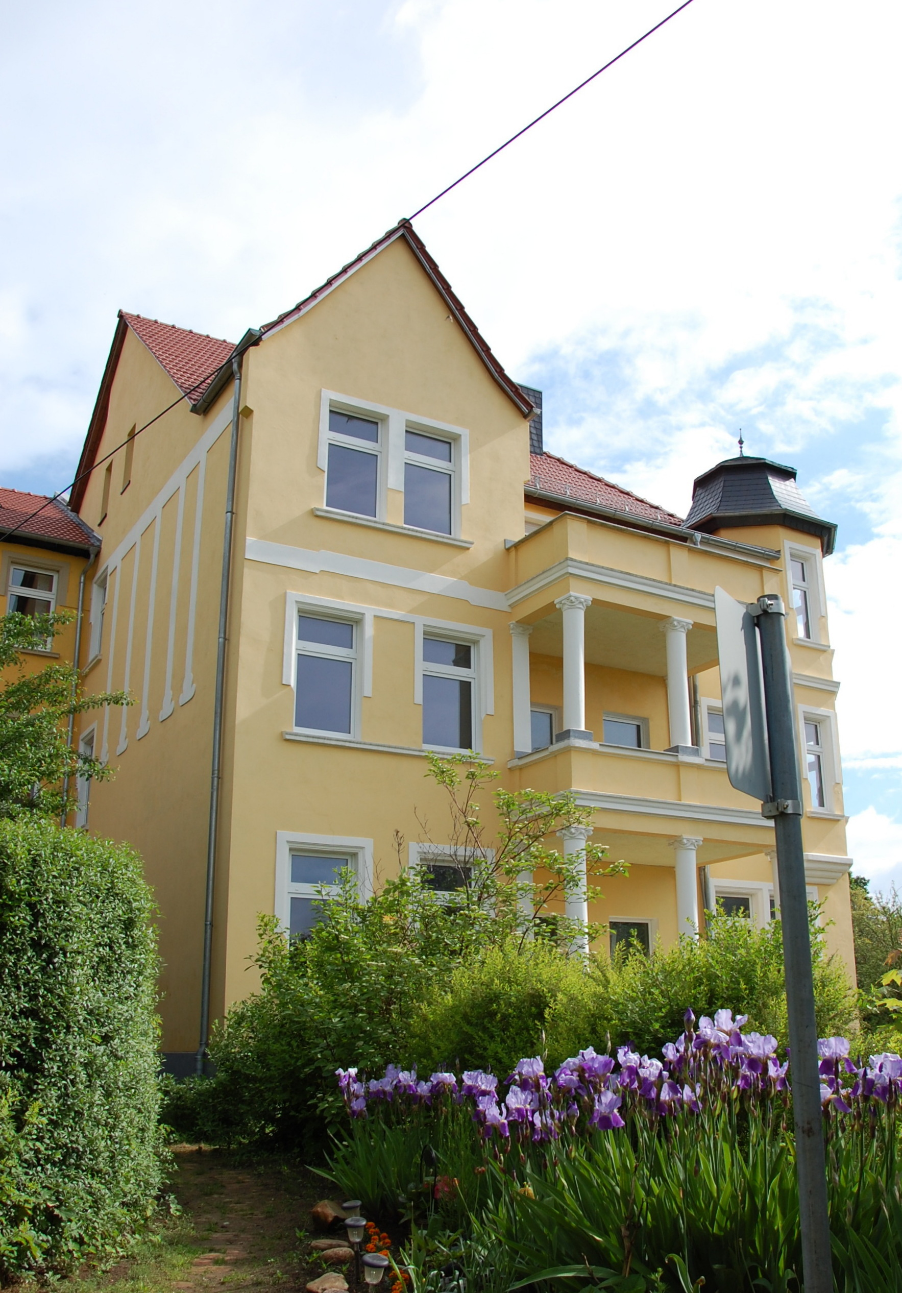 Haus Halberstädter Straße 18a-c in Quedlinburg